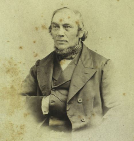 Bilde av repslagermester Hans Møller Wraamann (ung)